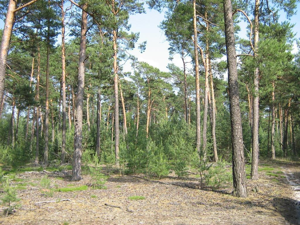 Kiefernwald auf armen Standorten in den Krausnicker Bergen (Landkreis Dahme-Spreewald, Brandenburg).